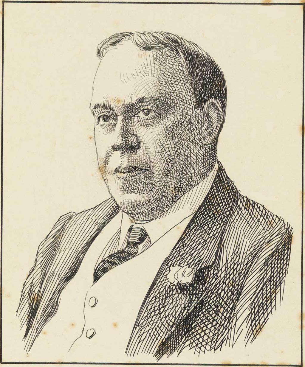 Filinto de Almeida